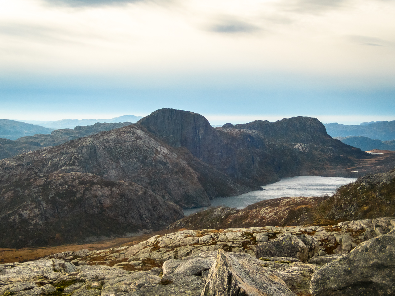 Frafjordhatten sett fra Jamnafjellet